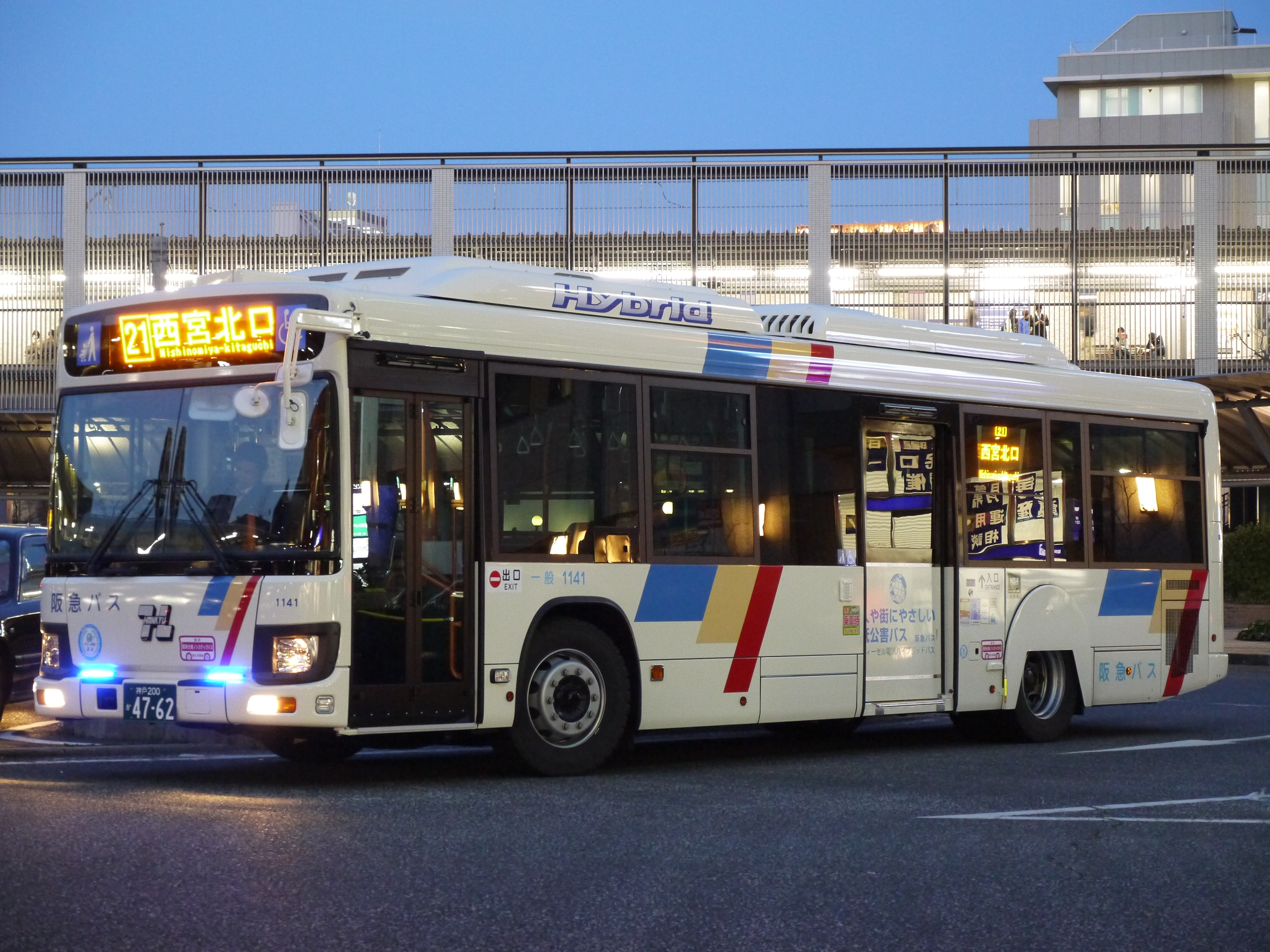 阪急バス西宮営業所所属の、新型ブルーリボンハイブリッド。 型式：日野QSG-HL2ANAP 車番：西宮1141（神戸200か4762）